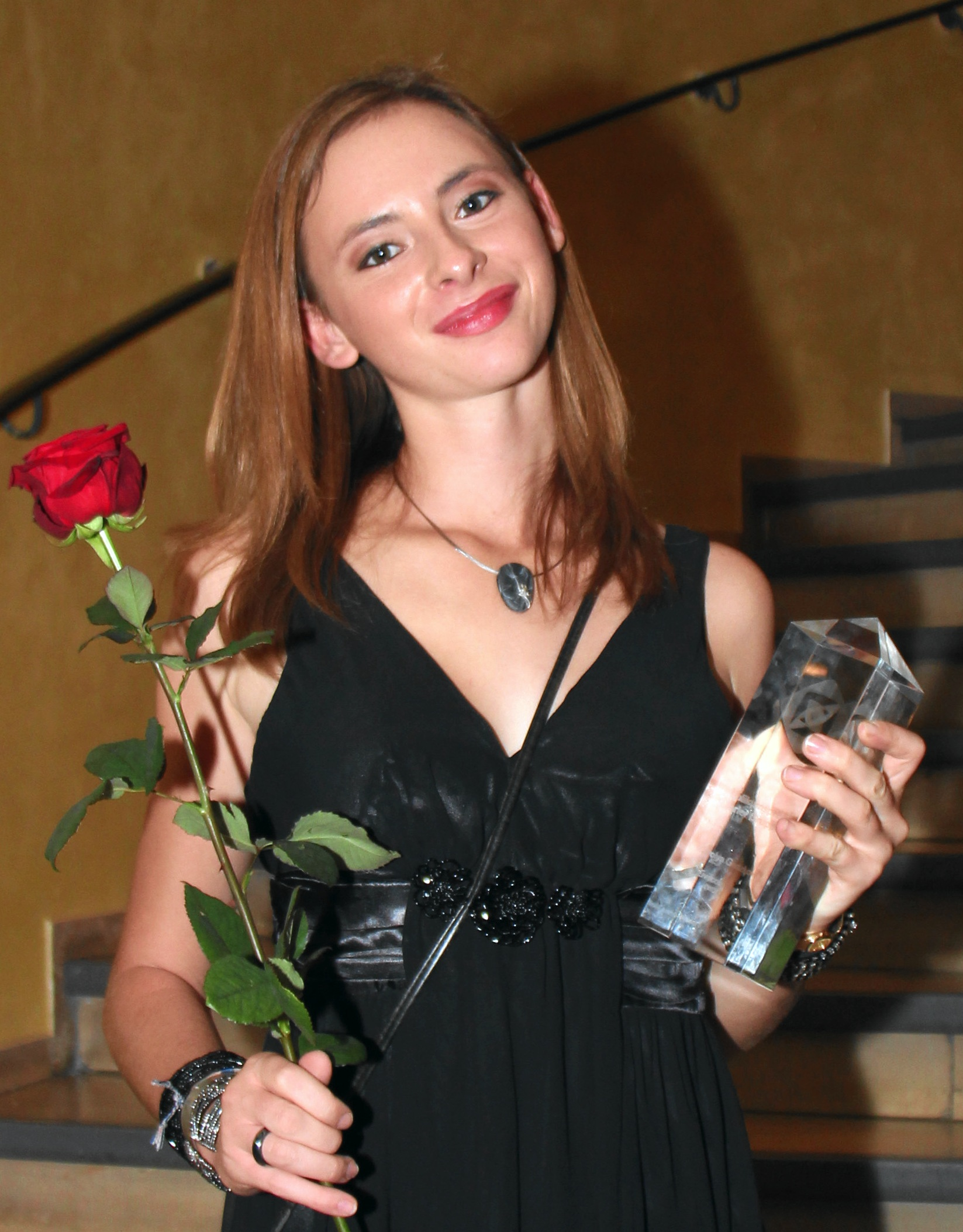 Grimme-Preisträgerin Carolyn Genzkow bei der Verleihung 2011